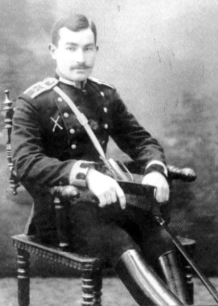 Fərrux ağa Qayıbov (1891-1916). Konstantinov hərbi məktəbini bitirmiş yunker Qayıbov.